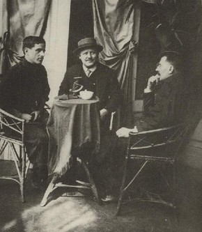 Alois Jalovec (1867 - 1932), Český kameraman. Na fotografii z r. 1913 Jar.Brabec (vlevo), Al.Jalovec (uprostřed) a Karel Pecháček (vpravo).